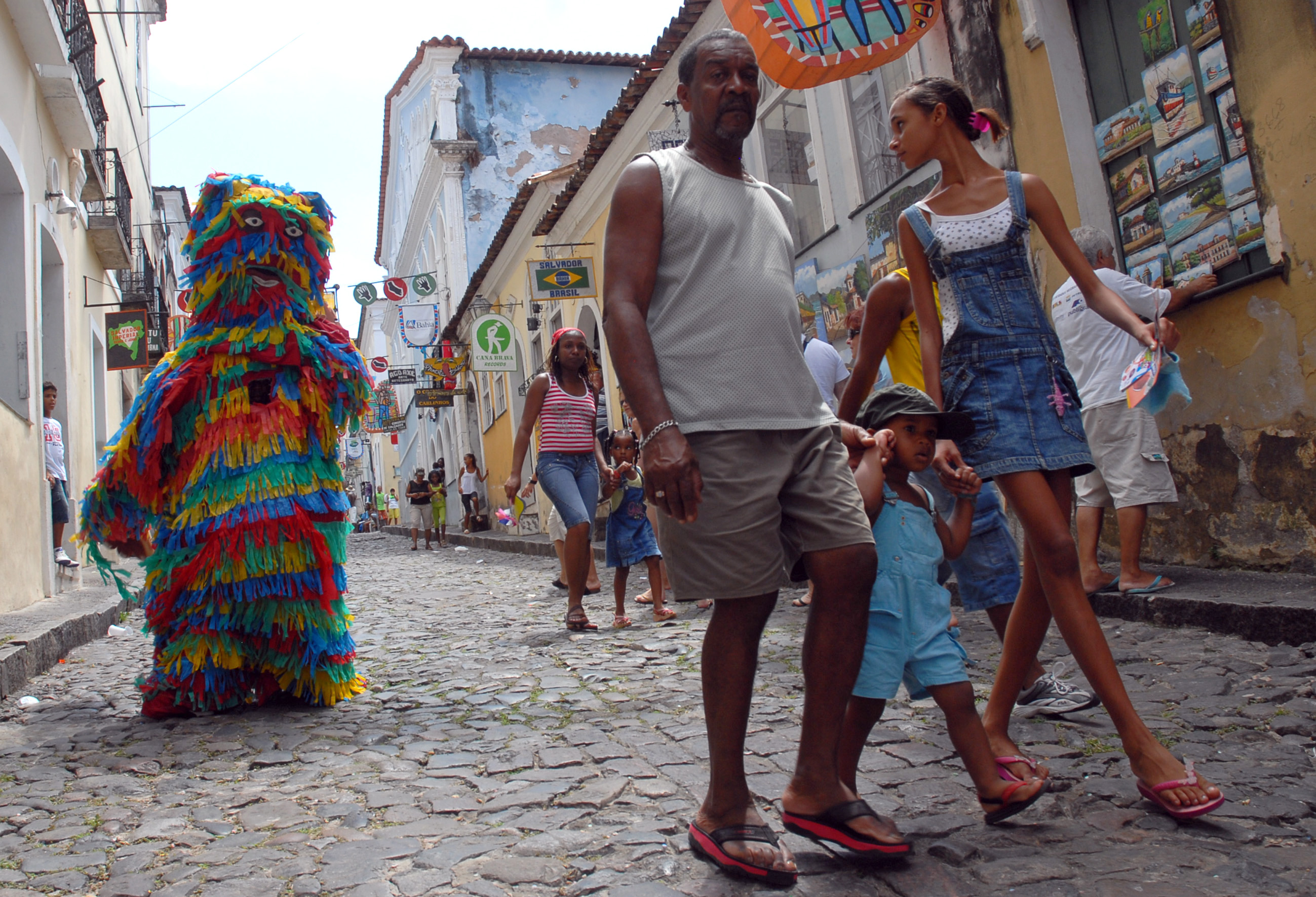 Salvador (BA) - Famílias começam a chegar ao Pelourinho, centro histórico da capital baiana, para assisitir ao desfile do afoxé Filhos de Gandhy.